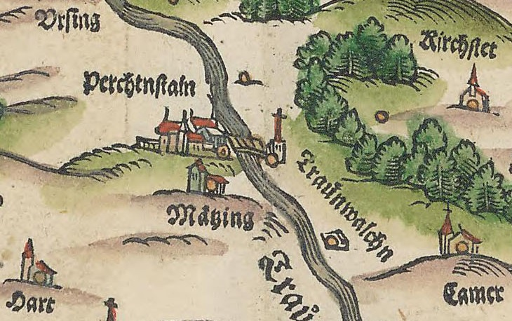 Bairische Landtafeln von Philipp Apian / Ausschnitt aus der Landkarte von 1568 Traunwalchen, Pertenstein, Matzing